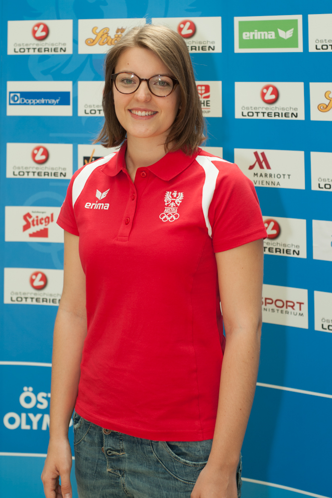 Einkleidung der Österreichischen Teilnehmer an den Olympischen Sommerspielen 2016 am 16./17. Juli 2016 in Wien. Bild zeigt Olivia Hofmann.